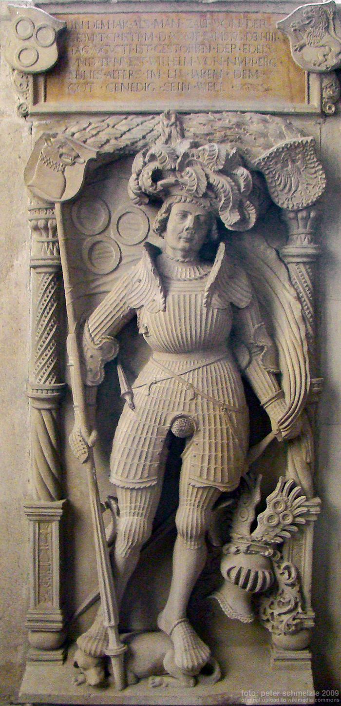 Grabmal des Georg Wilhelm von Neipperg in der Stadtkirche Schwaigern